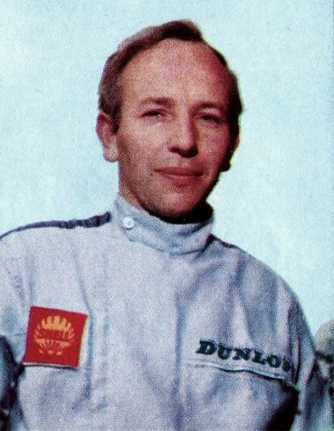 John Surtees en 1966 Campioni dello Sport 1966-1967, n°74